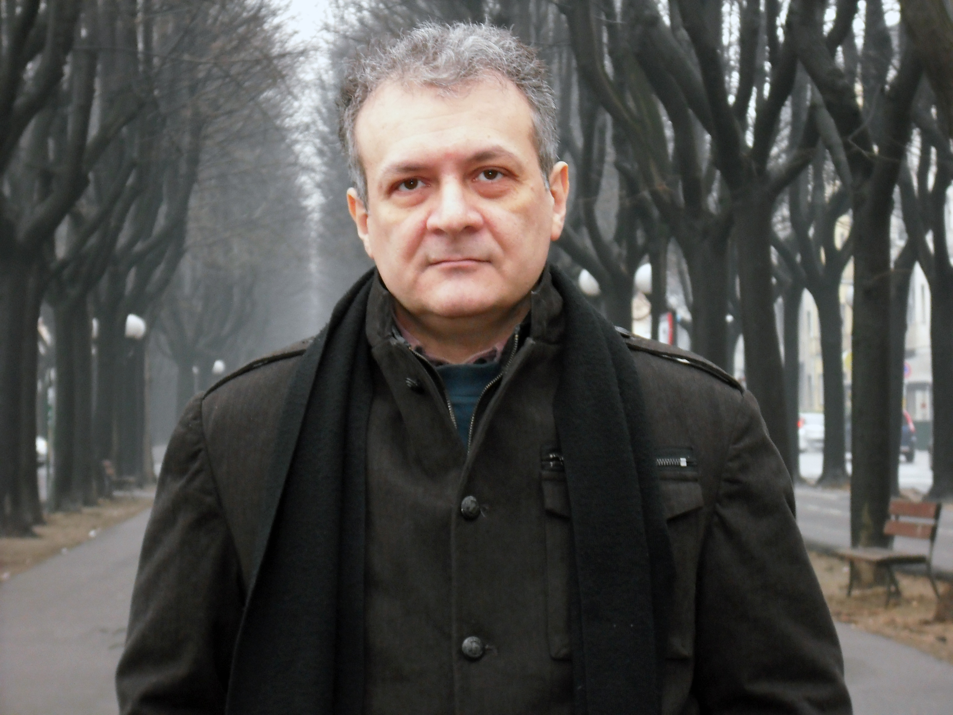 Franco Ricciardiello, 2009